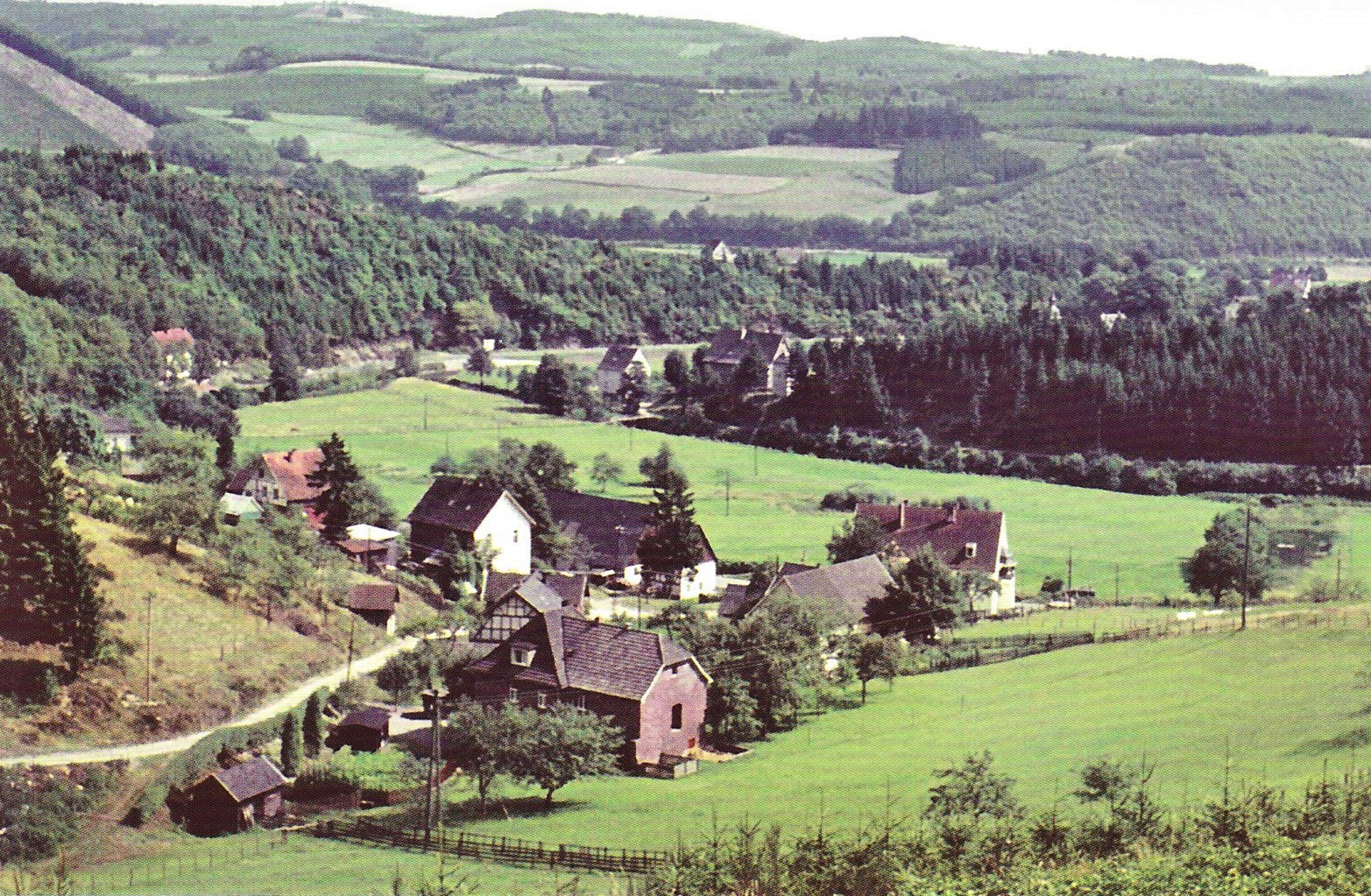 Blick auf den ehemaligen Attendorner Ortsteil Klinke, der dem Bau der Biggetalsperre (1956–1965) weichen musste. Postkartenfoto um 1960. Text: „Die Ortschaft führte im 16. Jh. den Namen Hülten- oder Holzenklinken, wobei "Klinge" das mittelhochdeutsche Wort für Gebirgsbach oder Talschlucht ist. Seit 1592 war Klinke Stammsitz der Familie Rüsche. Schon damals wurde hier ein Hammerwerk betrieben, das seine Arbeit erst um 1886 einstellte. Ab 1888 stand hier eine Schule für die Kinder der Umgebung.“ Foto: Archiv Willi Rüsche